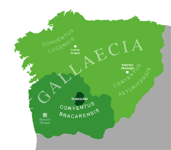 situación del pueblo de los tamaganos (TAMAGANI) dentro del convento Bracarense, en Gallaecia